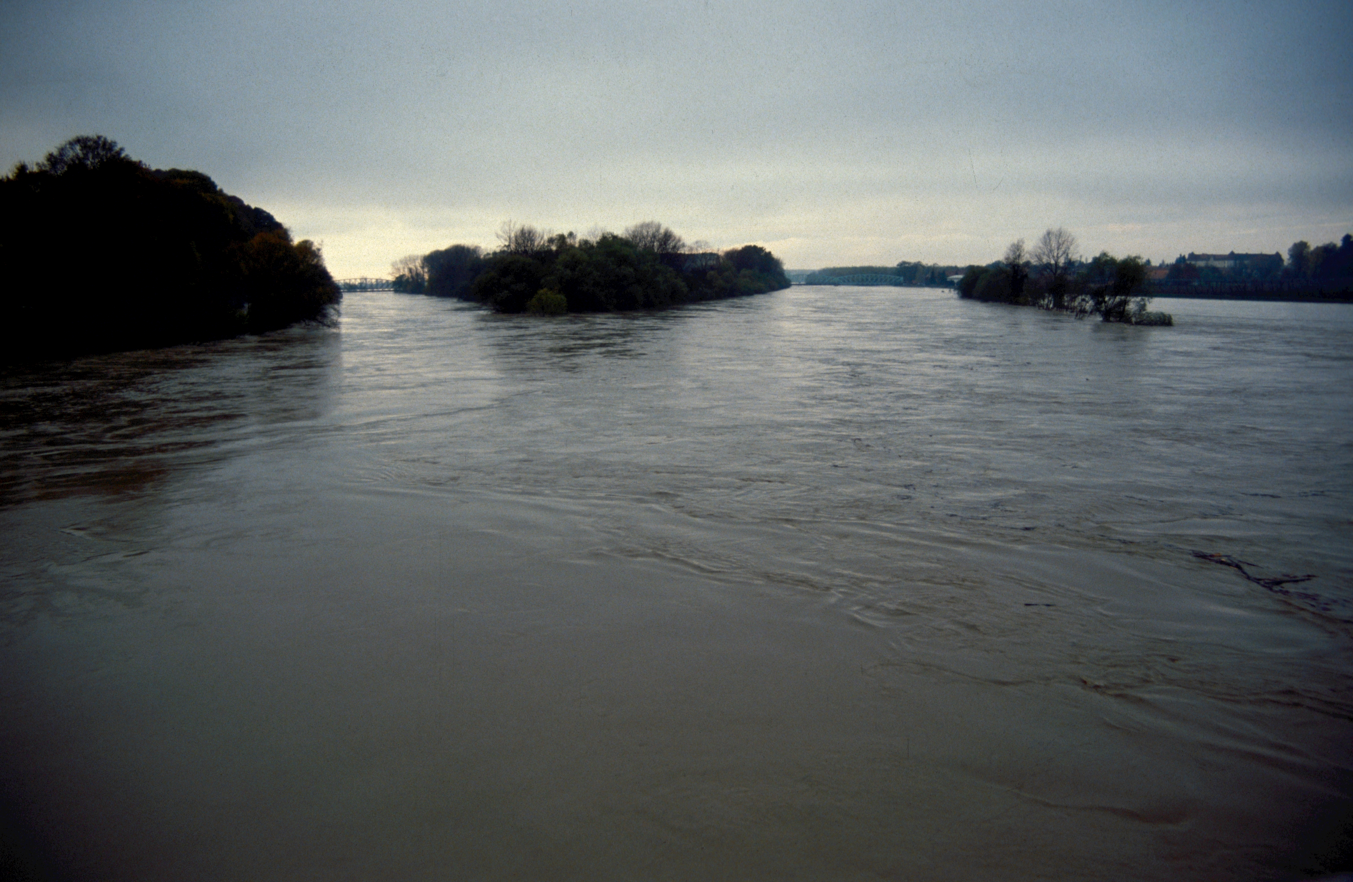 Pogled na sotočje Save in Krke pod Brežicami z mostu proti Čatežu - ob poplavi.